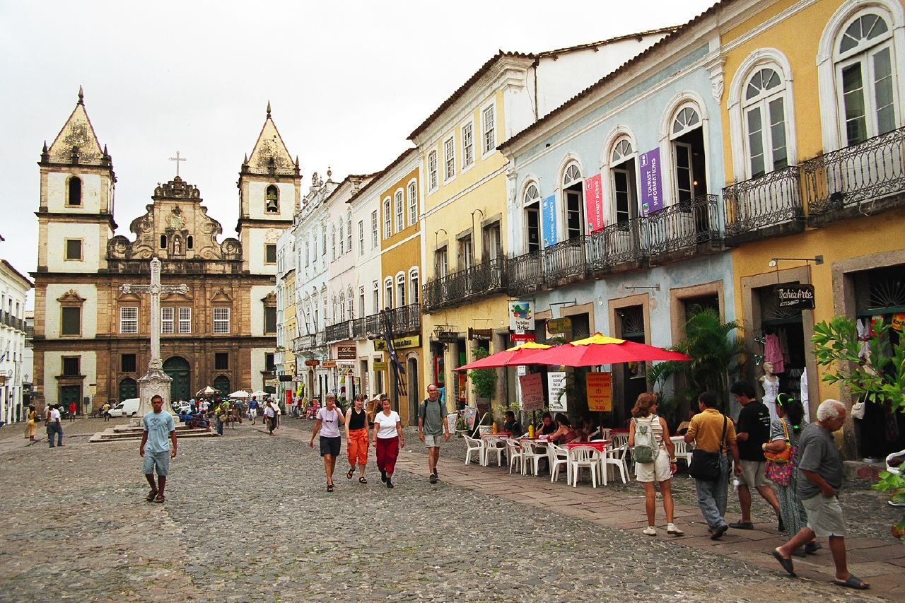 Pelourinho, Salvador, Bahia, Brasil.